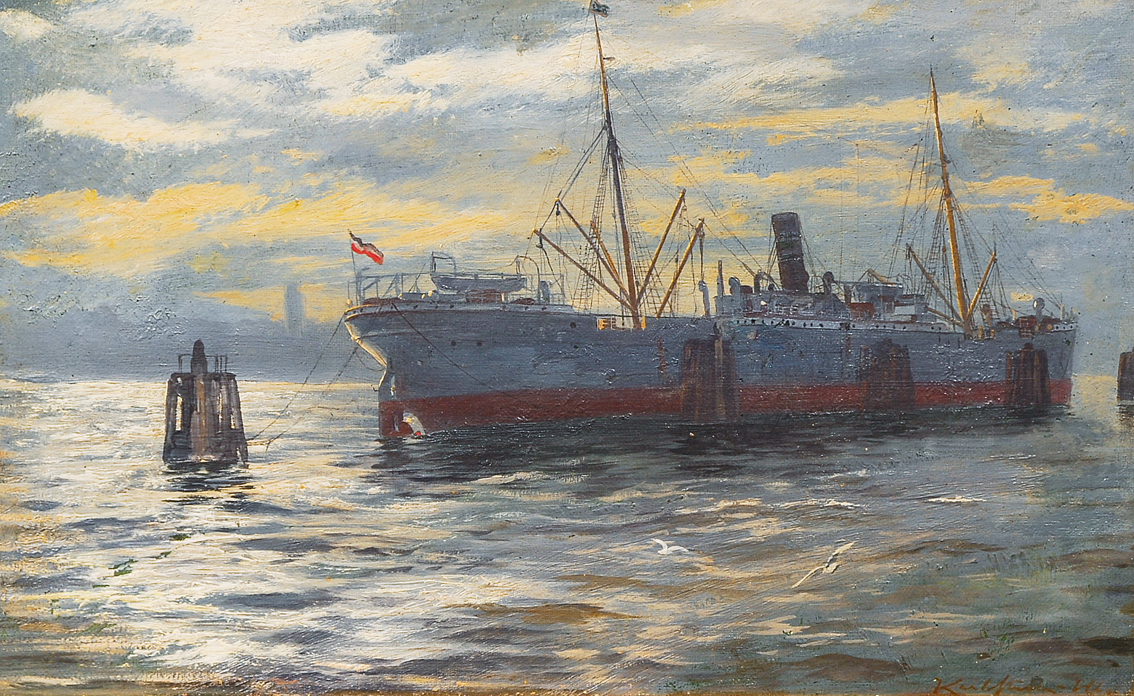 Frachtdampfer (Hamburger Hafen), Öl auf Leinwand (auf Karton aufgezogen), 25 x 39 cm